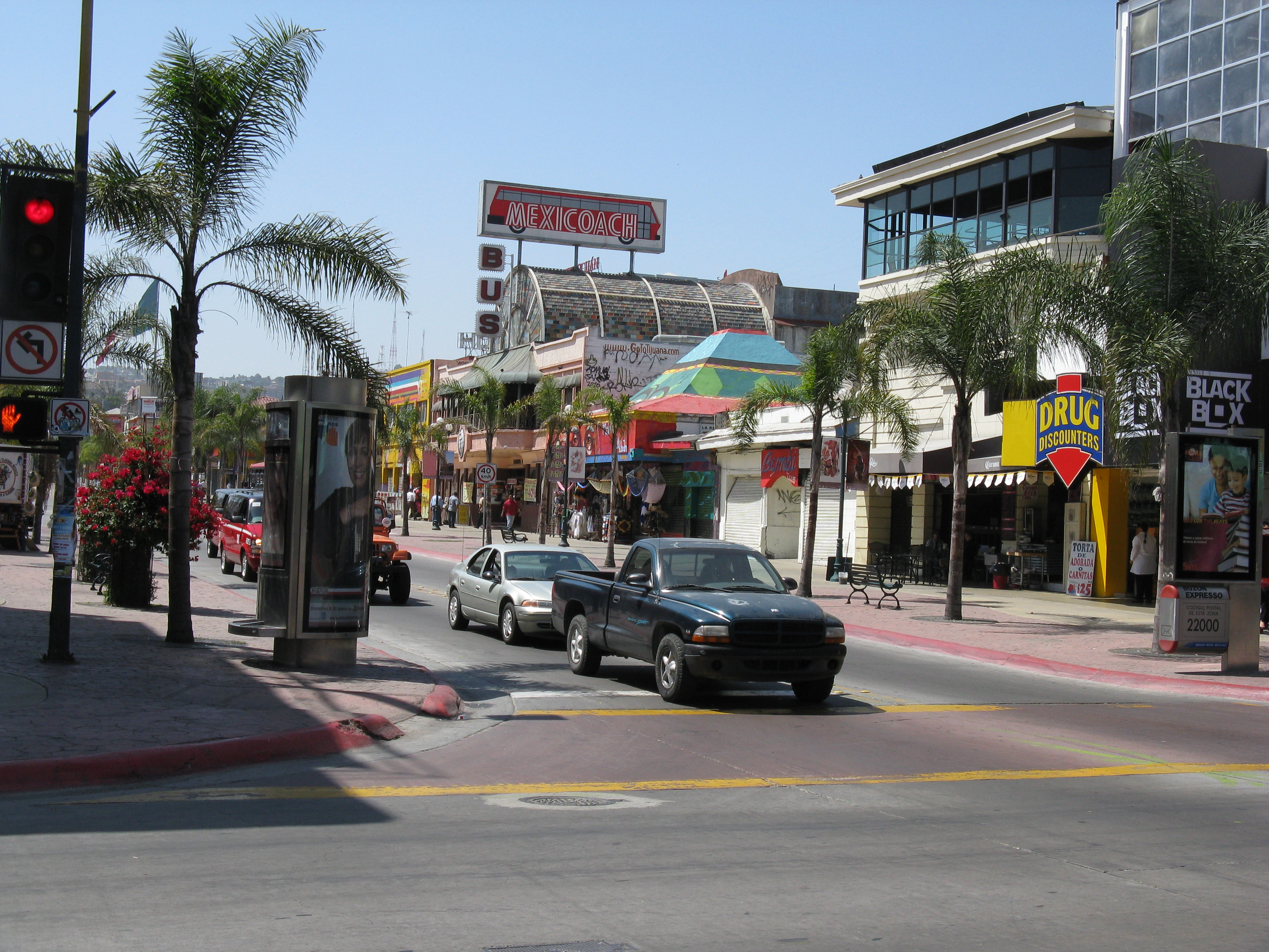 Revolucion street, Tijuana